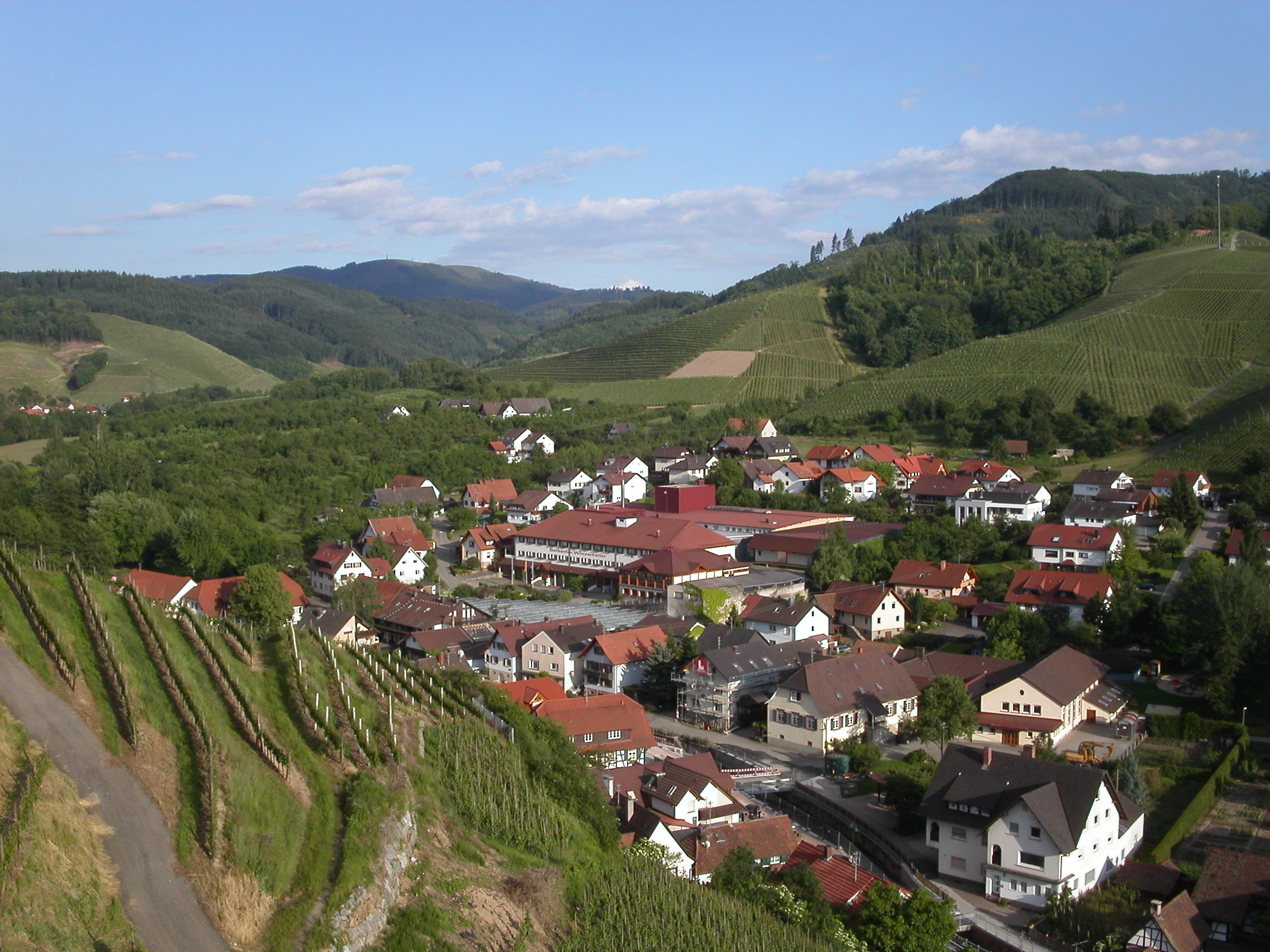 Östlicher Teil von Durbach, Blick vom Weinlehrpfad. In der Mitte das Hauptgebäude der Winzergenossenschaft.